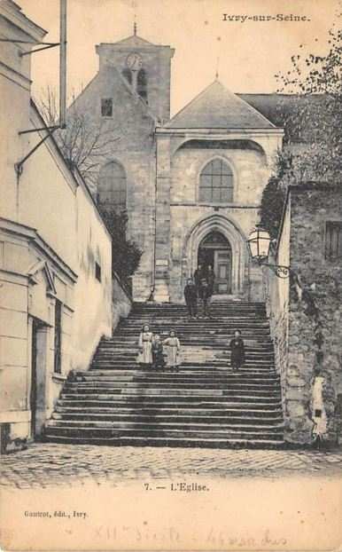 Ivry-sur-Seine.: L'église vue des escaliers